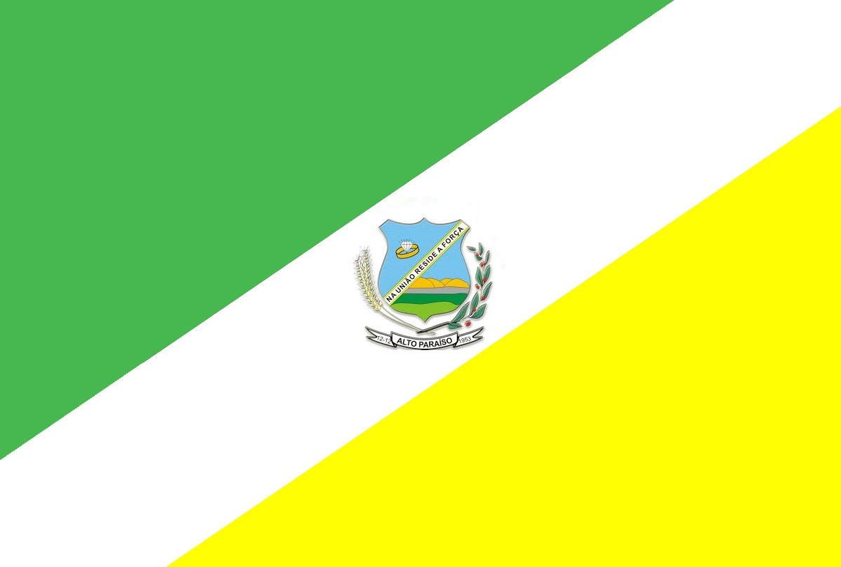 Bandeira de Alto Paraíso de Goiás, Brasil.